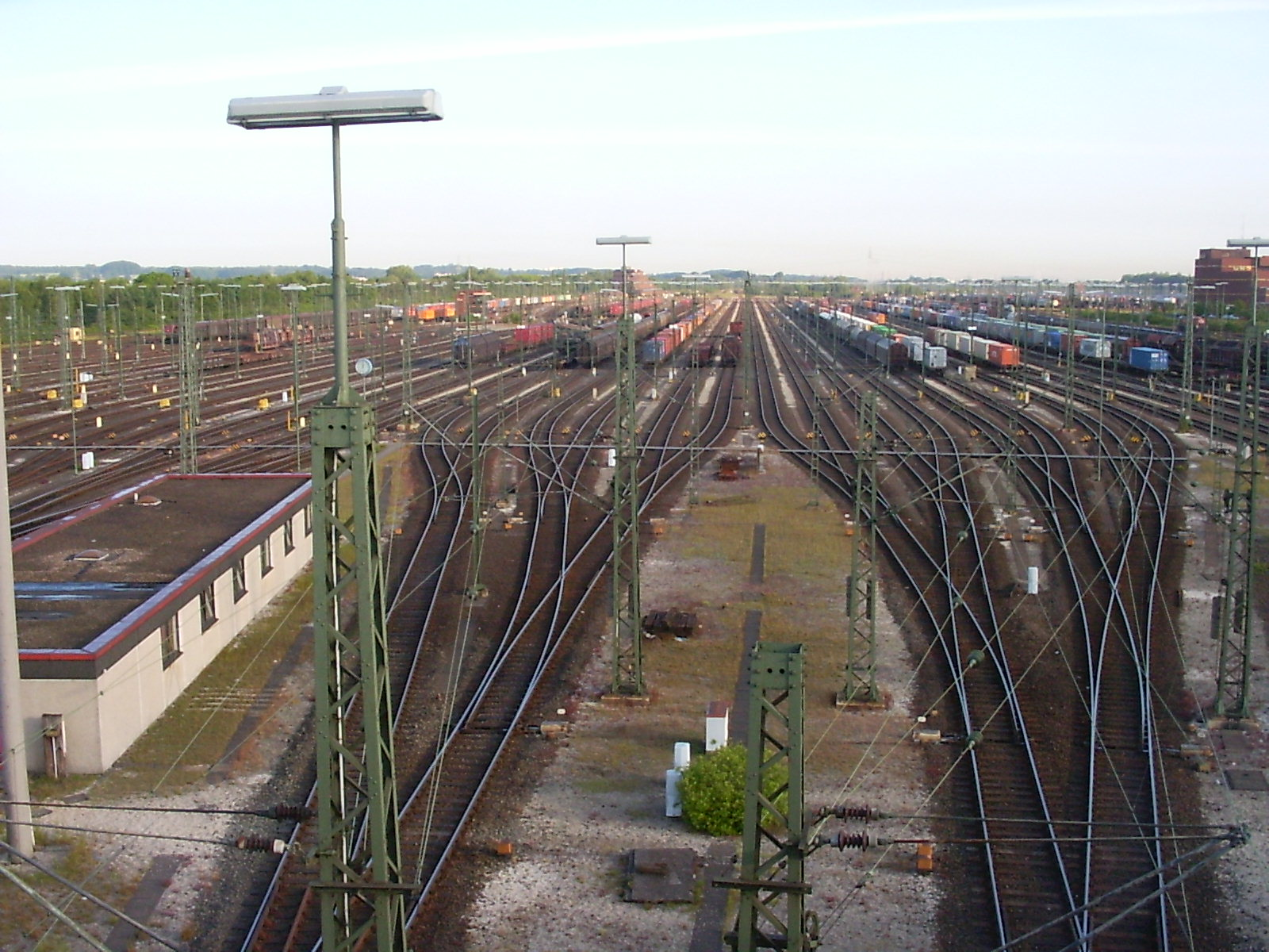 Rangierbahnhof Maschen, 48 Richtungsgleise im N/S-System für Zugbildungen Richtung Westen und Süden